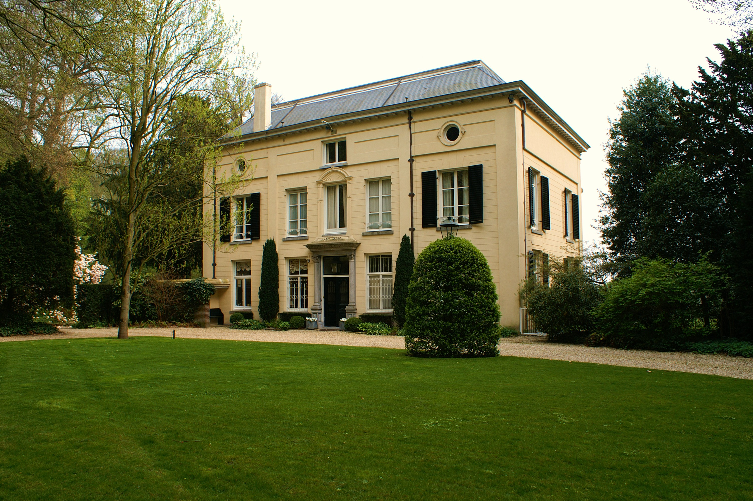 Huis Larenberg te Laren